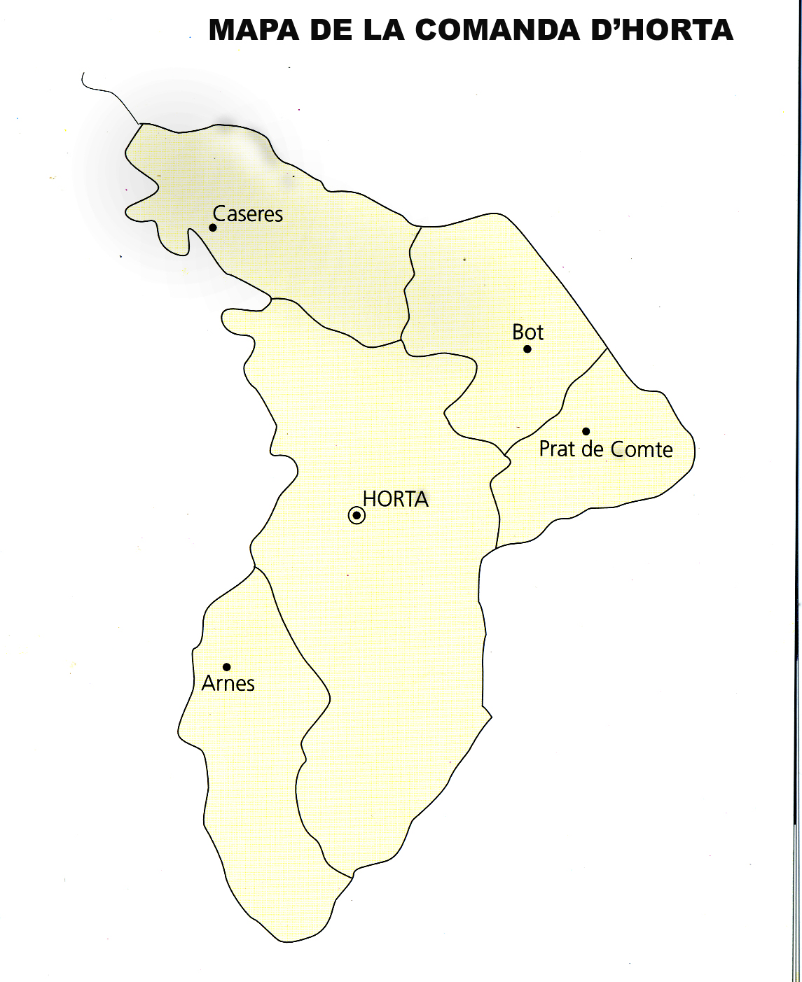 Horta de Sant Joan (Terra Alta). Mapa de la comanda templera d'Horta.